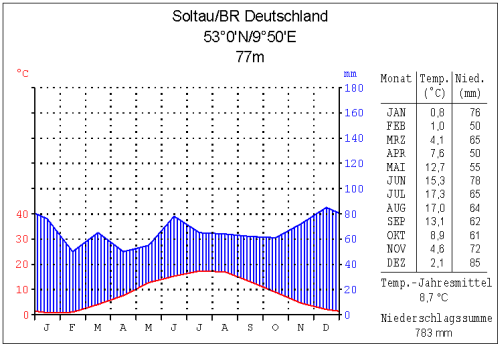 Klimadiagramm Soltau (selbst erstellt; GFDL) Climatic diagram for Soltau, Lower Saxony, Germany.